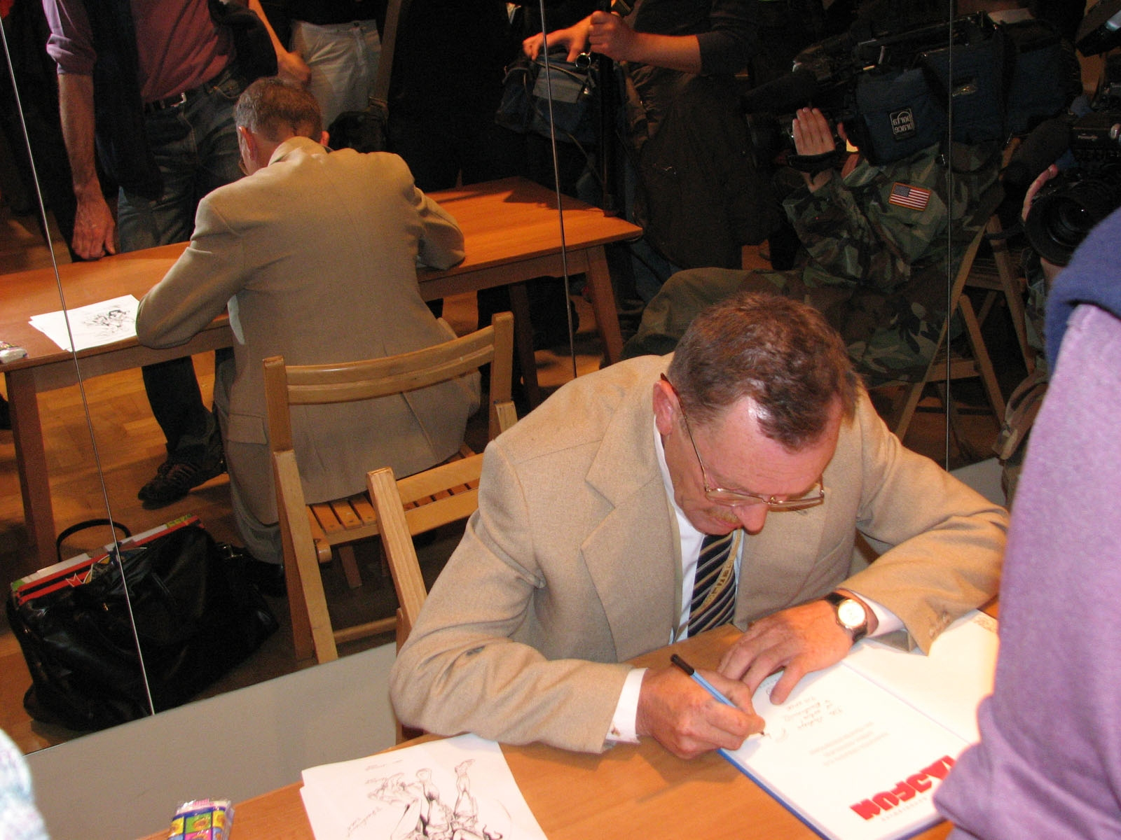 Rysownik Tadeusz Raczkiewicz na spotkaniu autorskim podczas XVII Międzynarodowego Festiwalu Komiksu w Łodzi (7 października 2006). fot. Arek1979